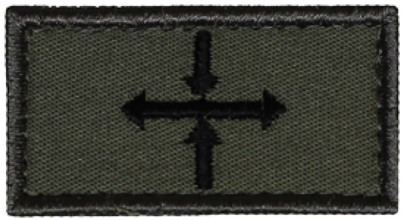 Abzeichen Stabsassistent